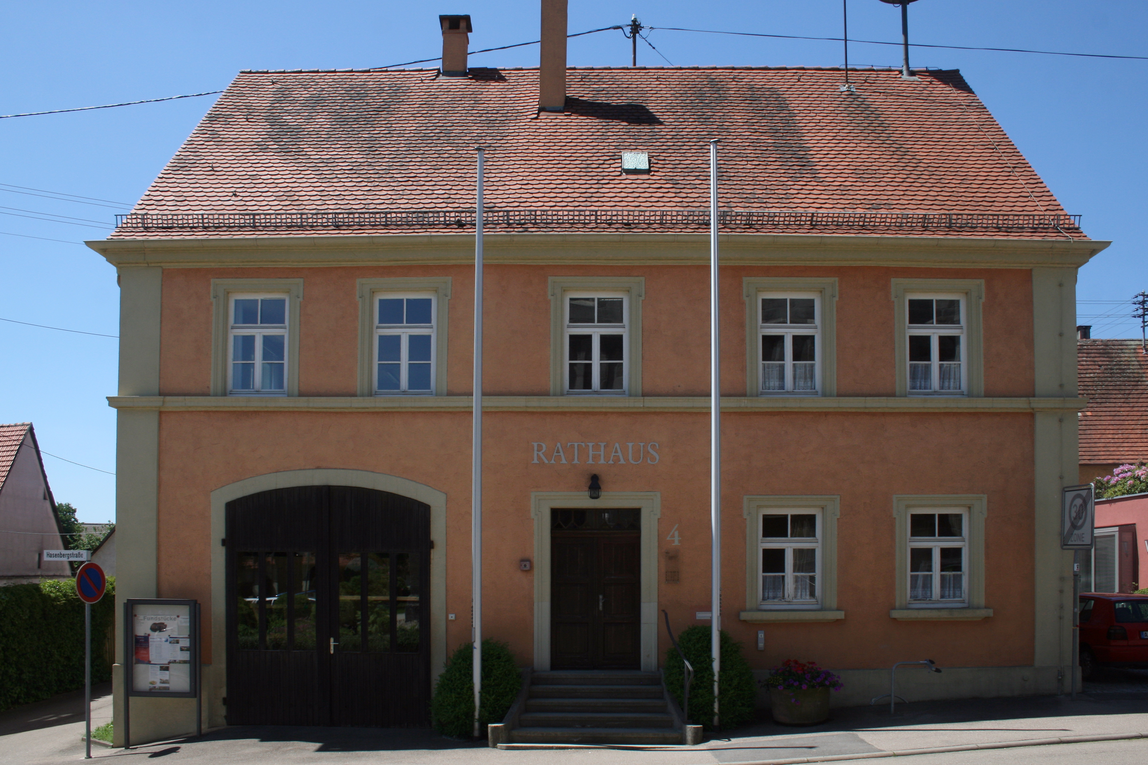 Ehemaliges Rathaus der Gemeinde Pfahlheim, erbaut 1877, letztmals genutzt im Jahr 1948. Pfahlheim ist seit 1973 ein Ortsteil der Stadt Ellwangen (Jagst).